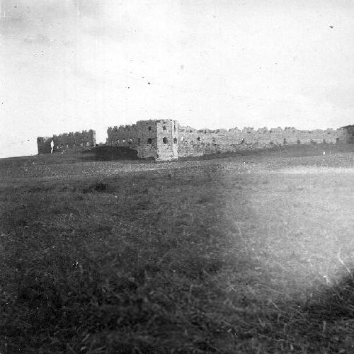 אנטיפטריס בתוך אלבום מסע של אדולף פרידמן לארץ ישראל ב-1903. הרצל היה בחלק מן המסע , במצרים, בה שהה בין 24 במרס עד 7 באפריל (מתוך ארכיון אדולף פרידמן A8/ באלבום שני תצלומים של הרצל על סיפון האנייה כנראה מעת מסעו לארץ ישראל ב- 1898)